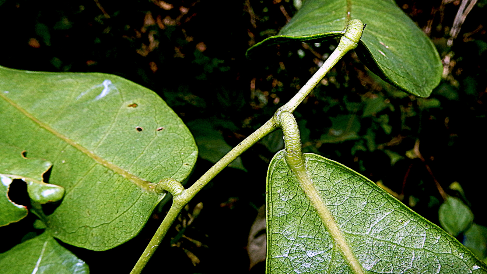 Poecilanthe falcata (Vell.) Heringer